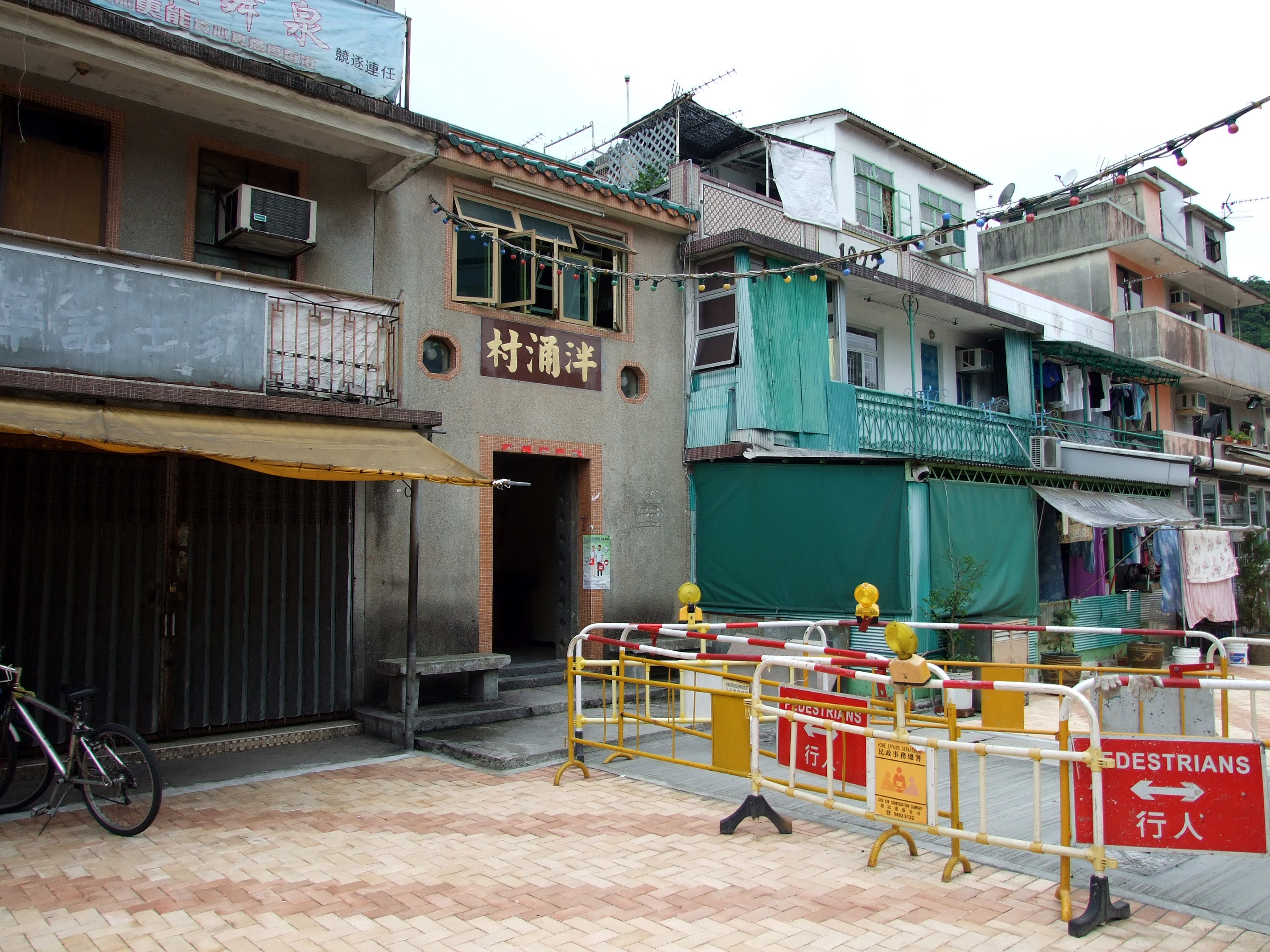 中文（香港）: 大埔泮涌